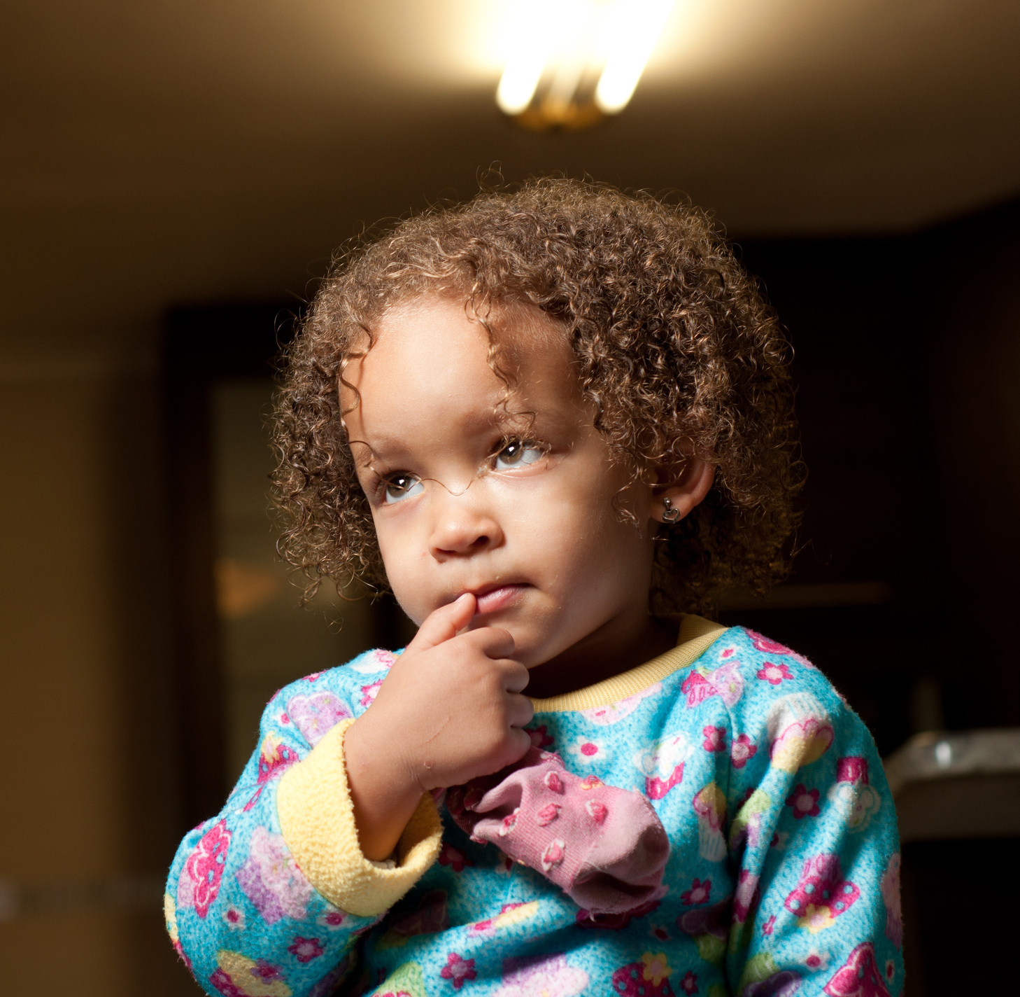 Riley